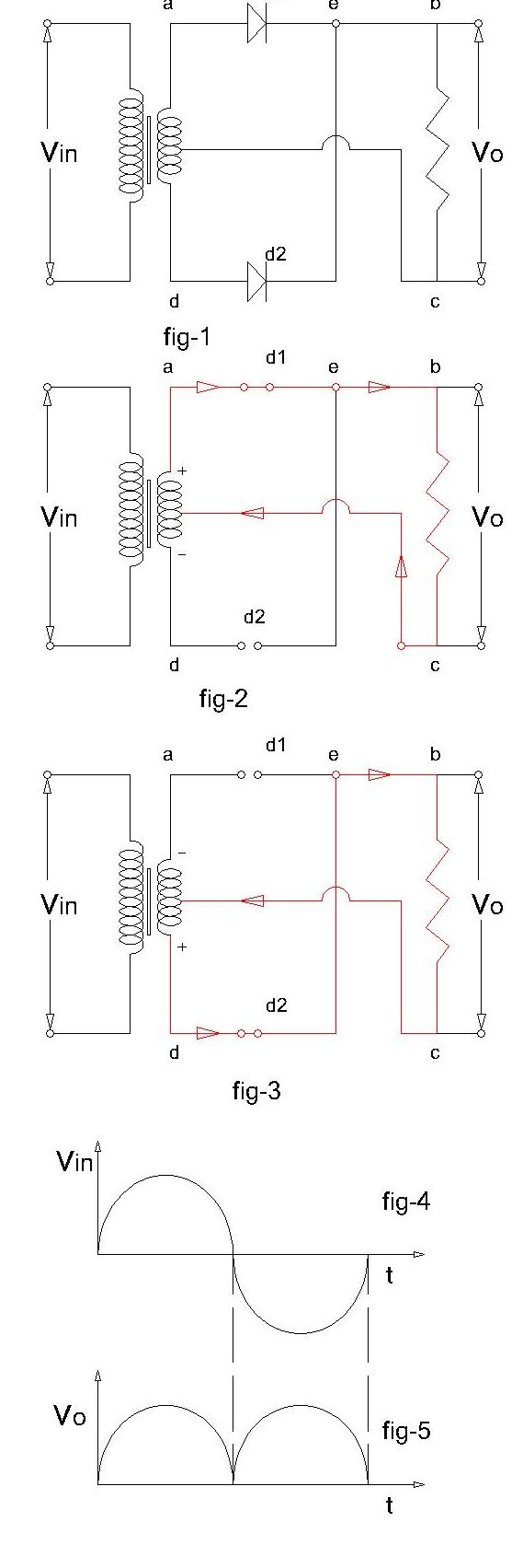 full-wave rectifier diode 2